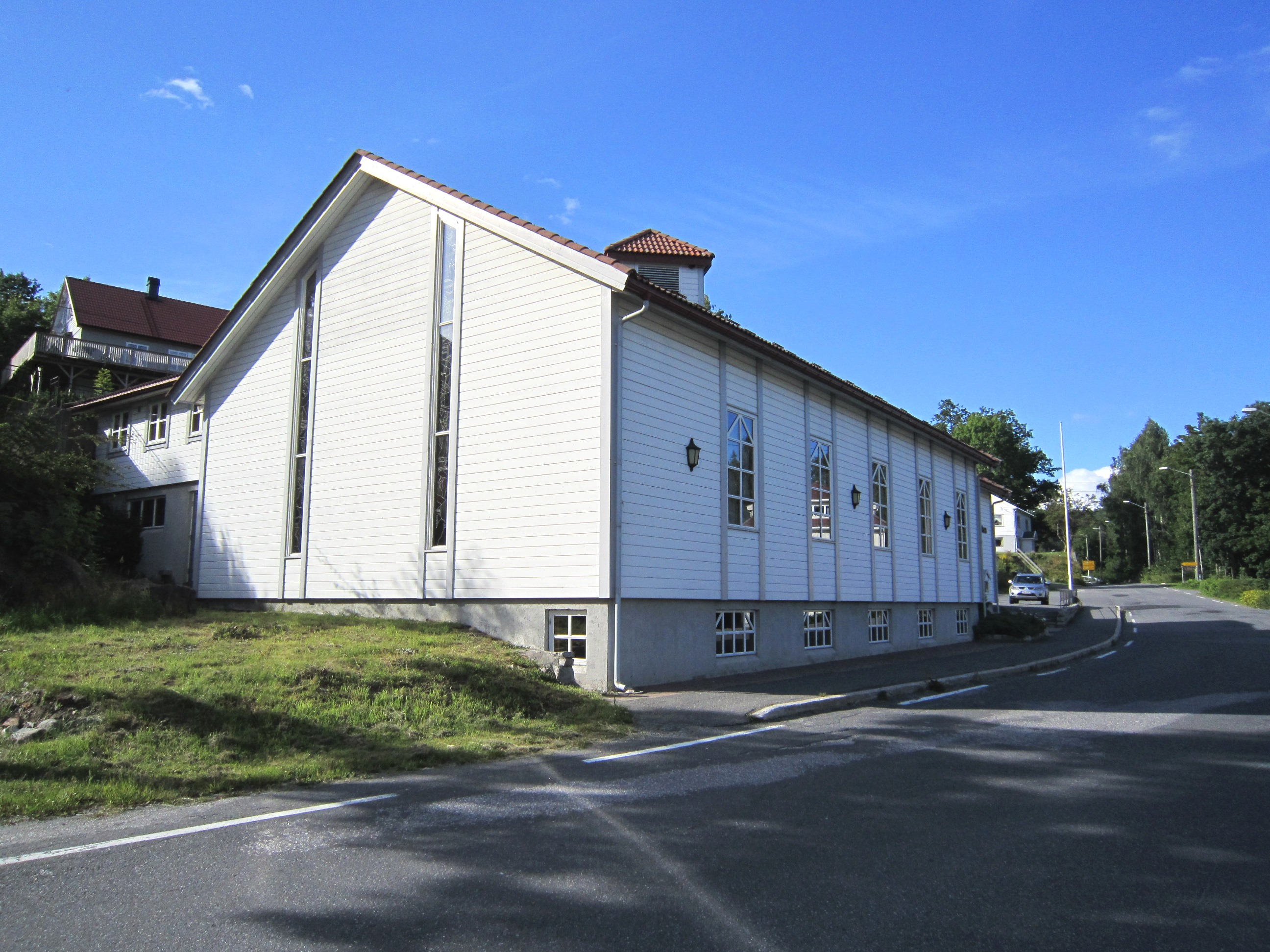 Songe frikirke og Gamle Songevei (fylkesvei 11)